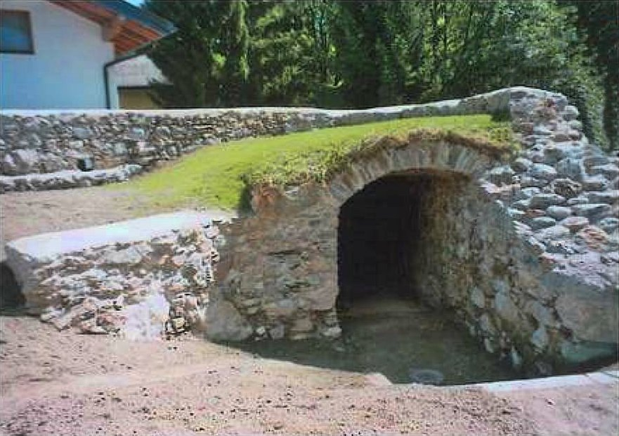 Paßanlage, Paß Mandling